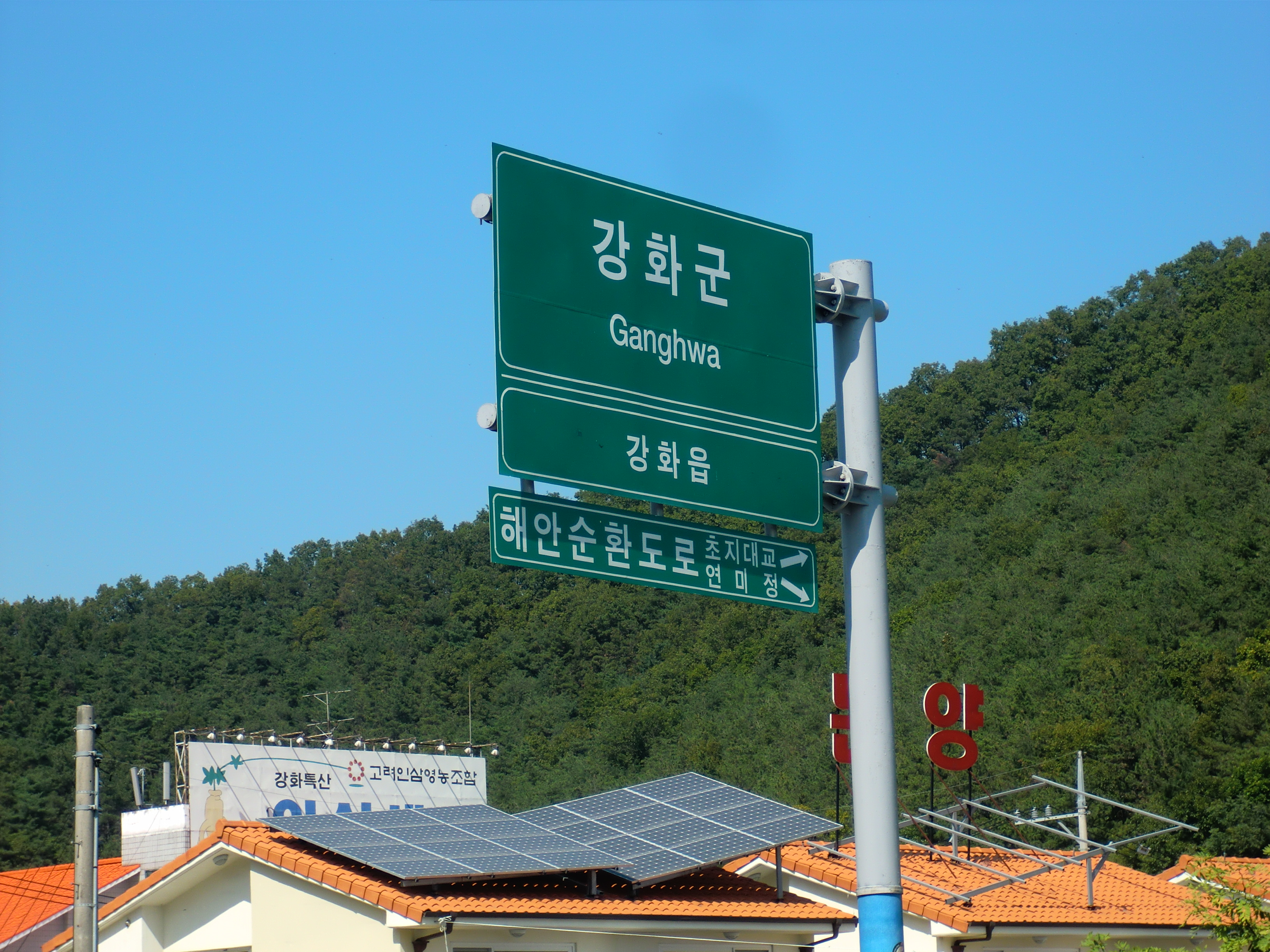 국도48호선에 있는 경기도 김포시와 인천광역시 강화군의 경계